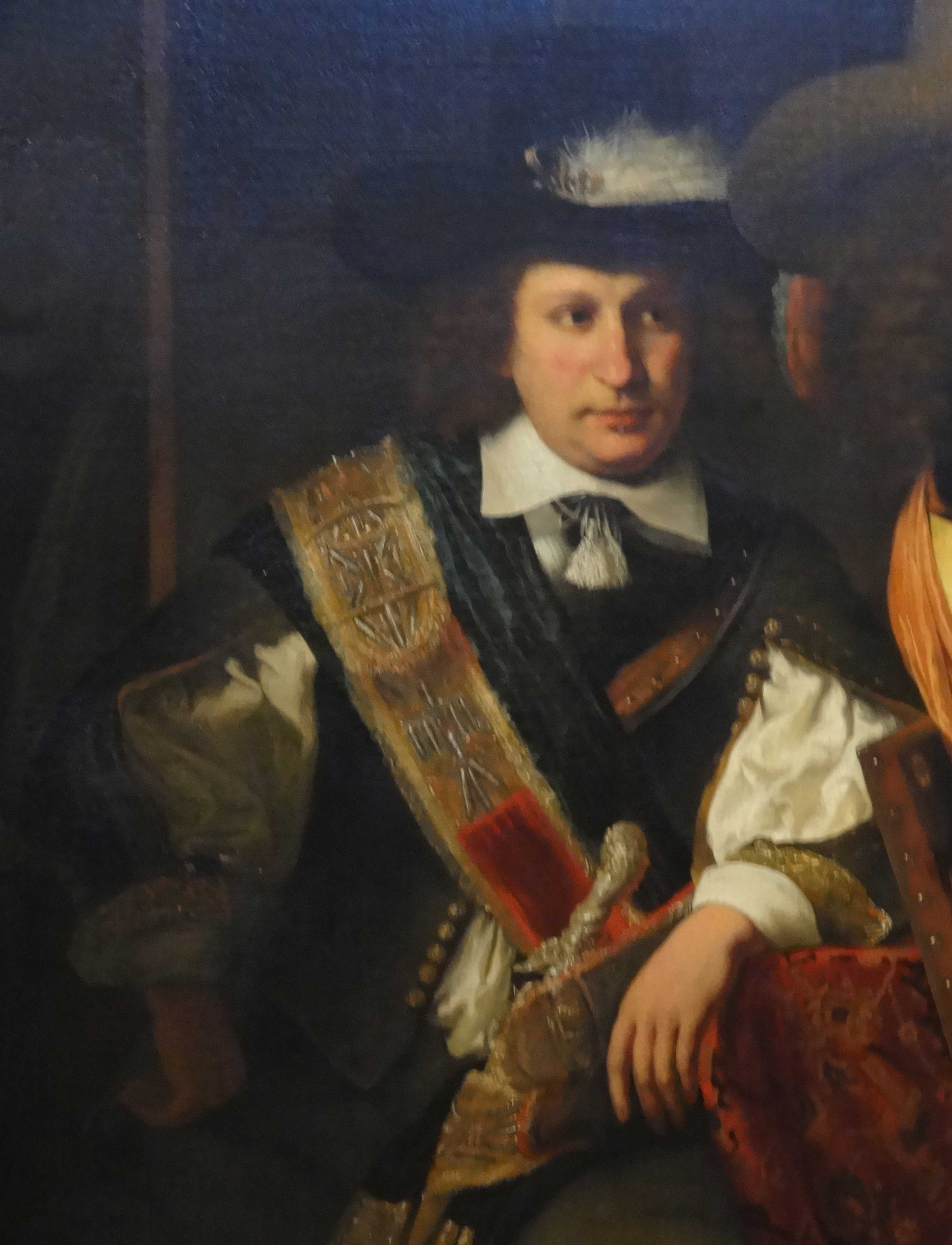 Schuttersstuk, schutterij onder leiding van kolonel Govert Suys (detail Govert Suys)